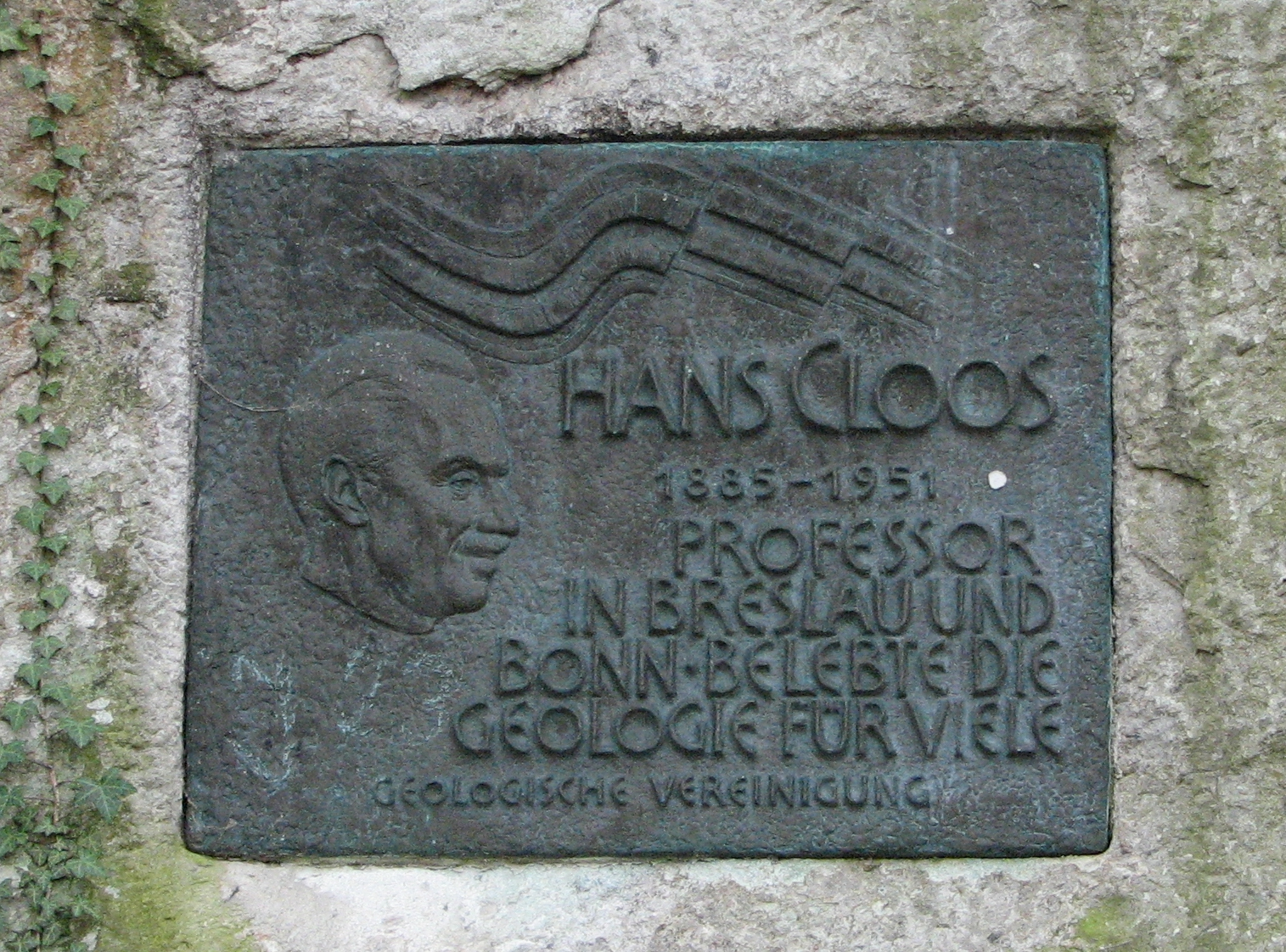 Gedenktafel Hans Cloos am am „Eselsweg“ auf den Drachenfels, Drachenfelsstraße, Königswinter